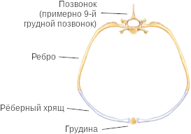 Нормальная форма грудной клетки (вид со стороны хвоста). Бурманский/бенгальский типы тела. Это перевод левой части рисунка